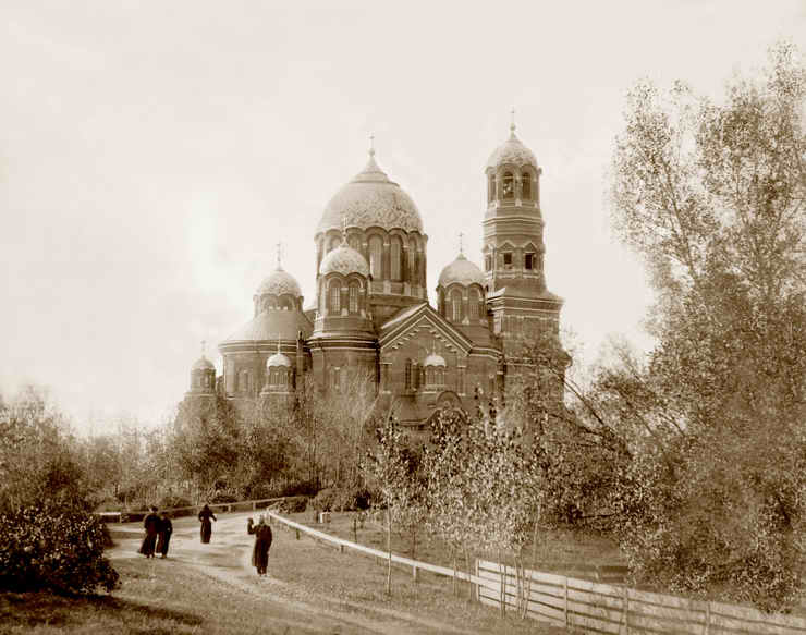 Самара. Кафедральный собор. Фотография. ~1905 год.